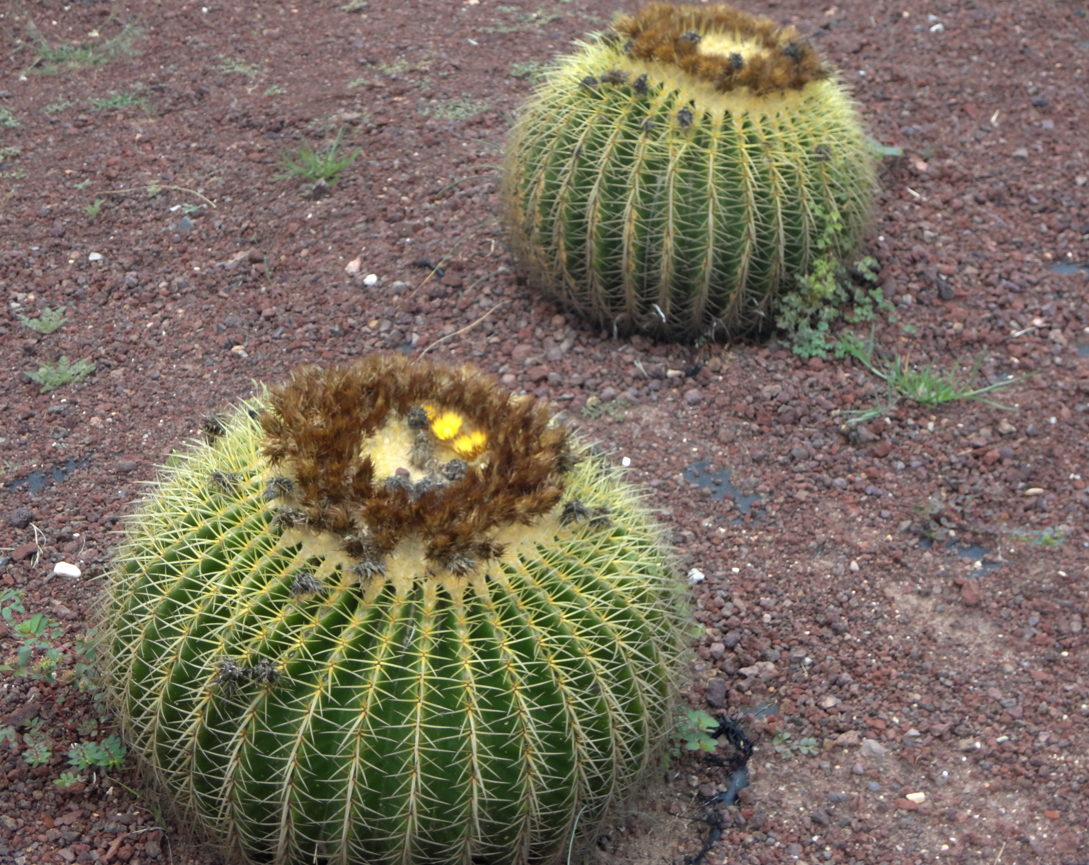 Cactáceas en la Universidad Tecnológica del Norte de Guanajuato (UTNG), Dolores Hidalgo, Guanajuato, México.